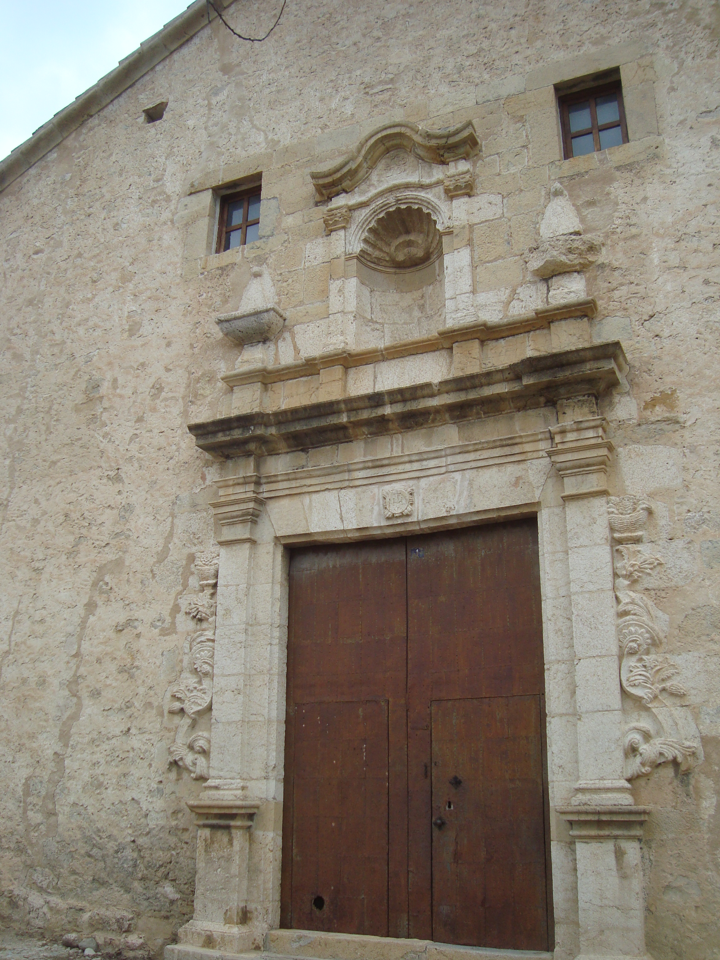 Església parroquial de Sant Blai i Santa Magdalena d'Hortells (Morella) 01.080-025.